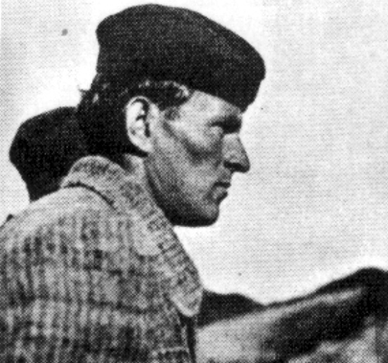 Srpskohrvatski / српскохрватски: Peko Dapčević